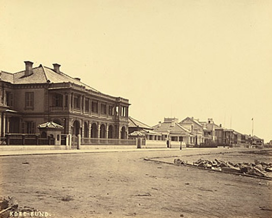 神戸外国人居留地メリケン波止場前。1872年。 神戸外国人居留地2番にあったウォルシュ商会